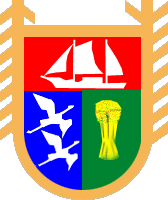 Karjala: Lahdenpohjan vuakuna